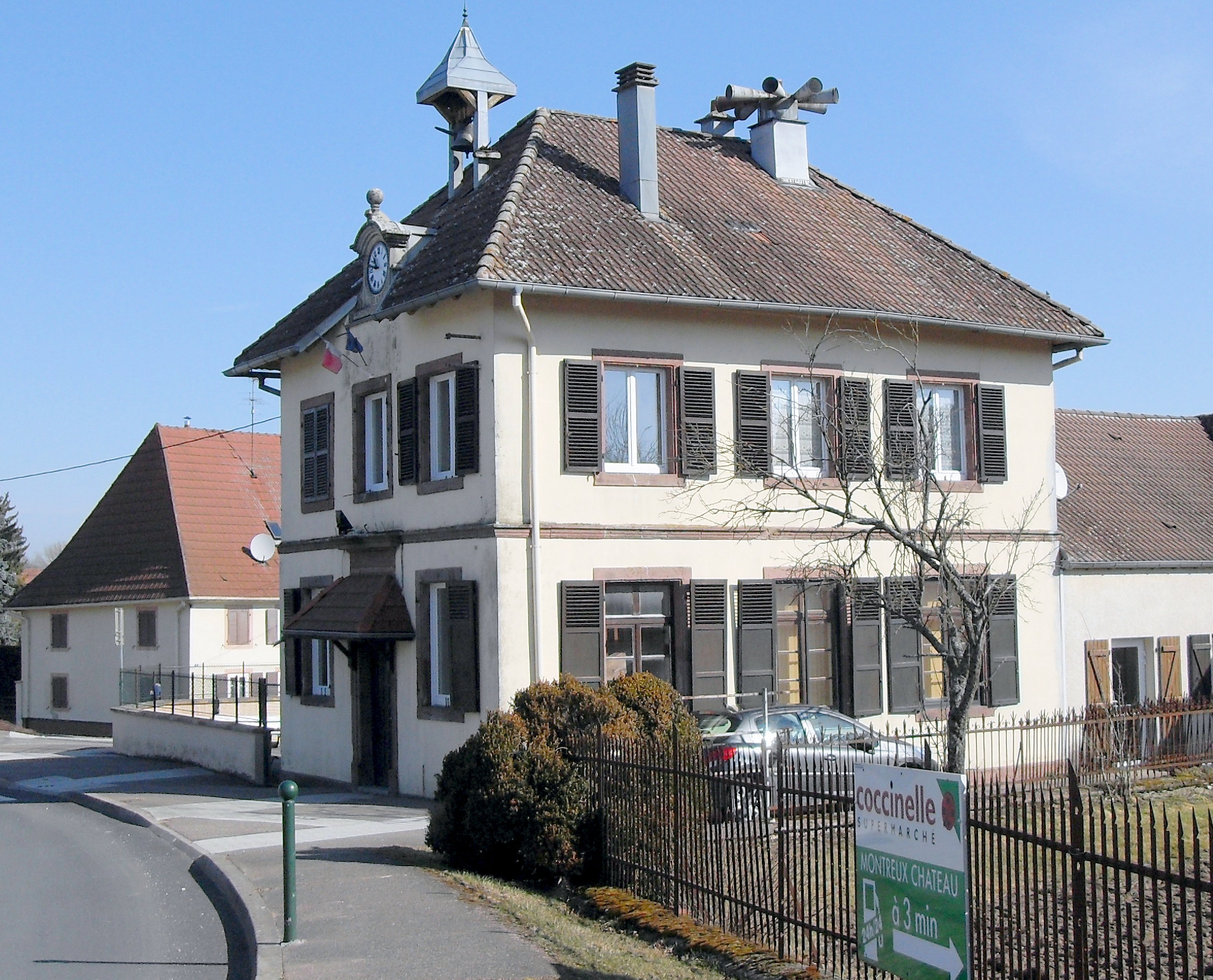 La mairie de Frais